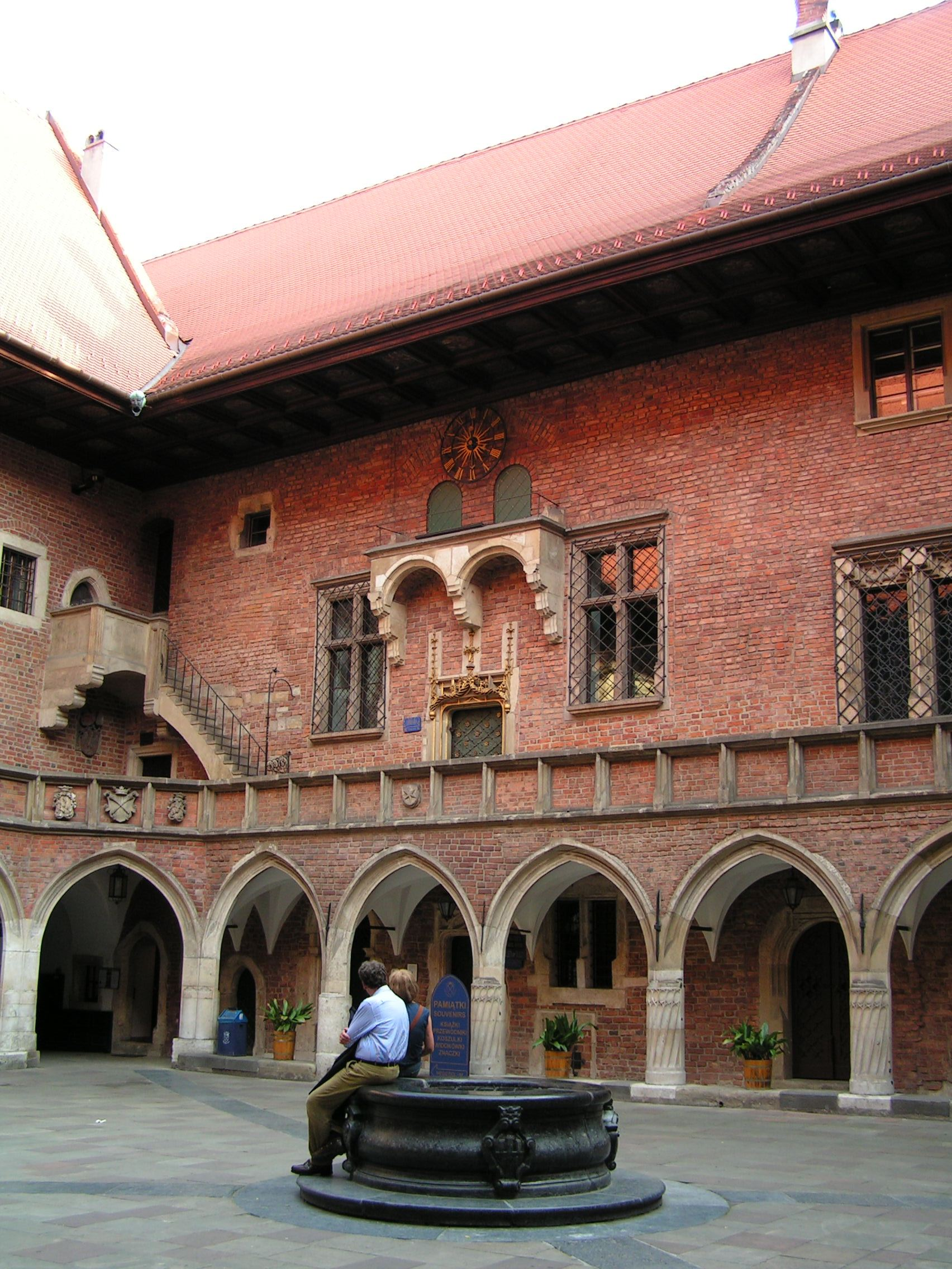 Collegium Maius, Kraków